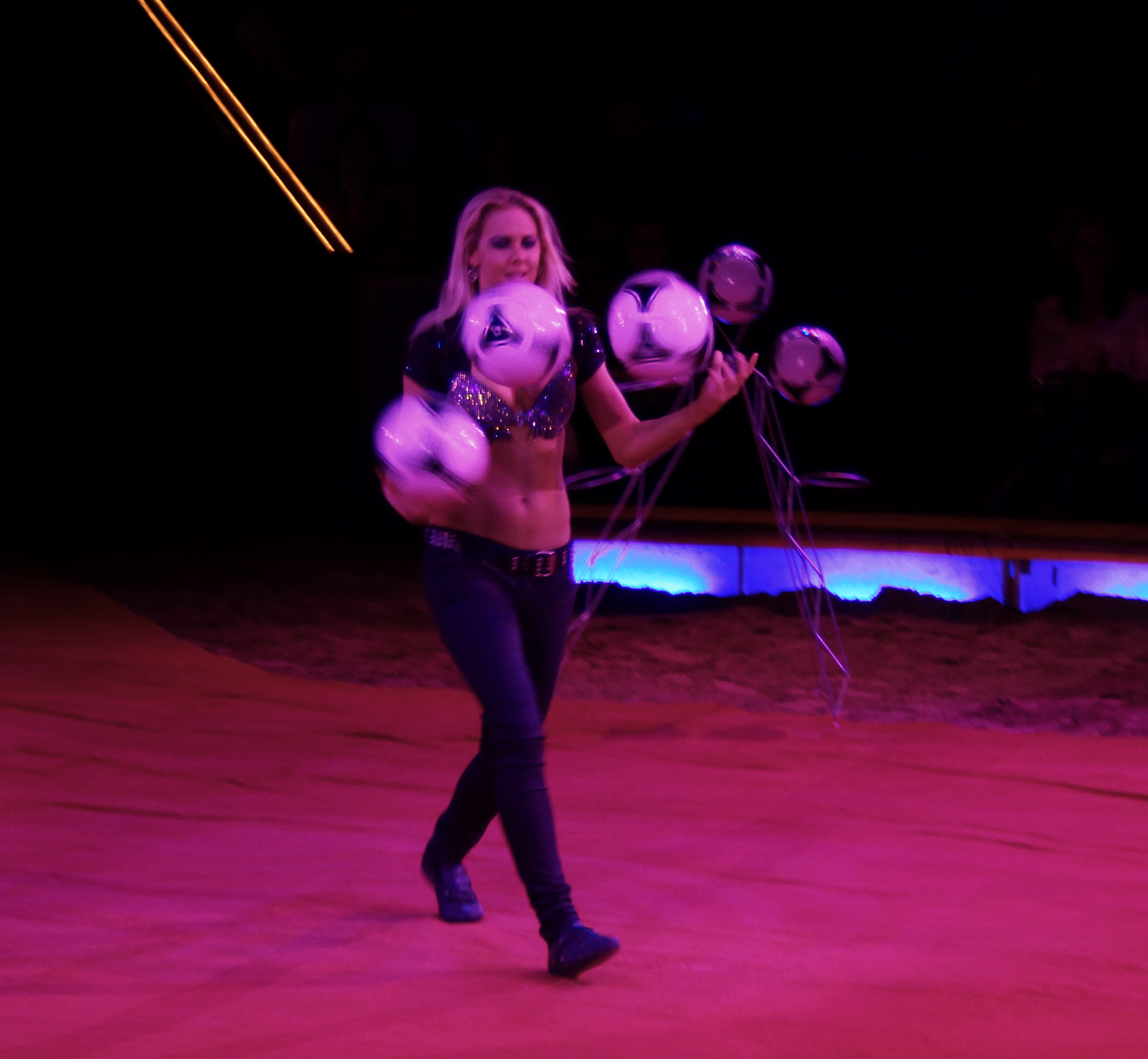 Helena Polach Jonglage mit Fußbaellen